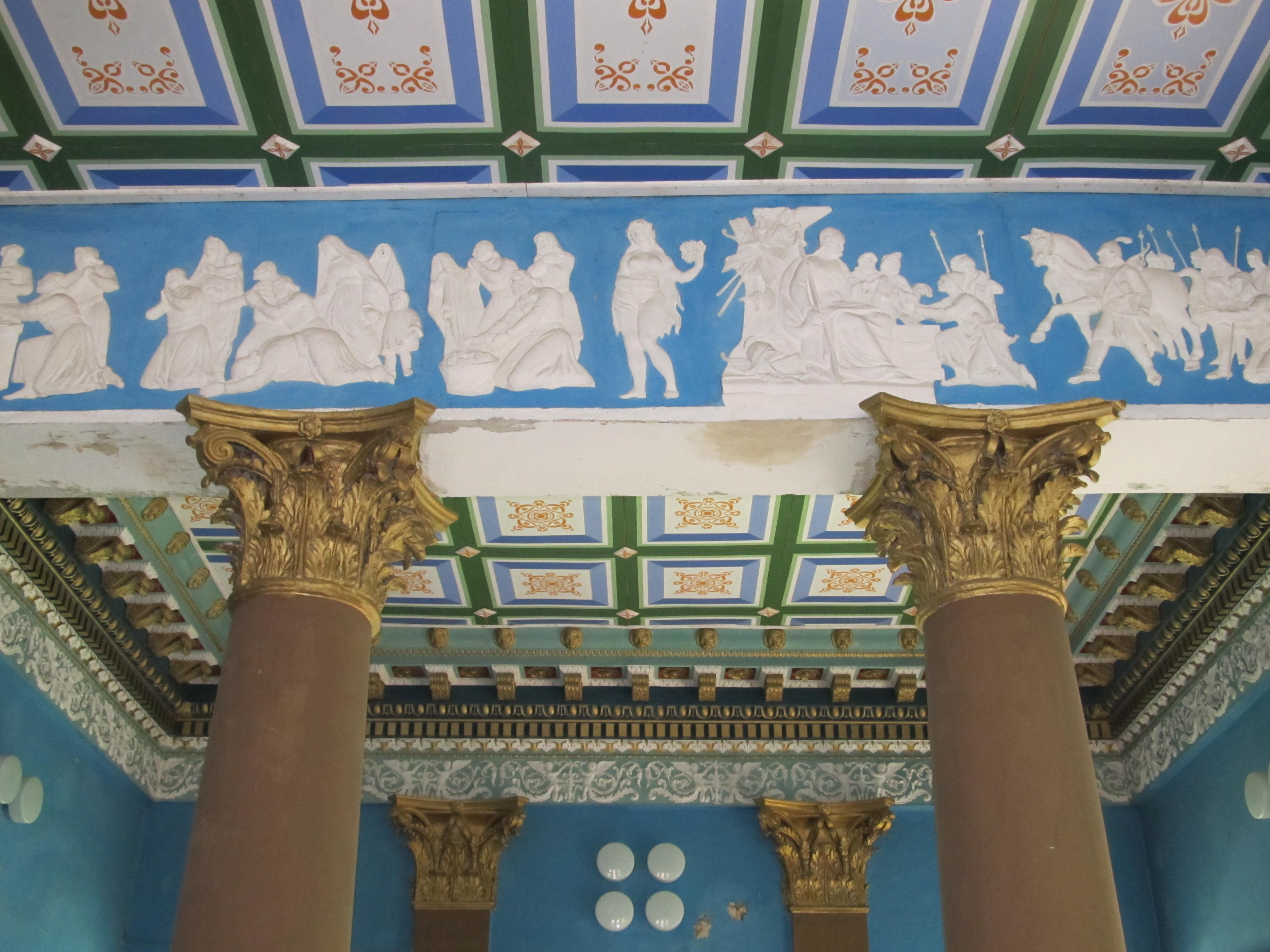 Беларуская (тарашкевіца): Палацава-паркавы ансамбль: палац з дэкаратыўным аздабленьнем інтэр’еру (ляпны дэкор, камін і печ, падлога з меандравым арнамантам, плафоны столі), гаспадарчыя пабудовы, парк. в. Жылічы This is a photo of Belarusian heritage monument. Reference number: 512Г000459 ( WLM)